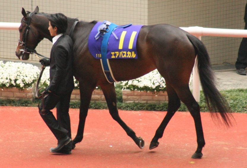 エアパスカル (Air Pascal)